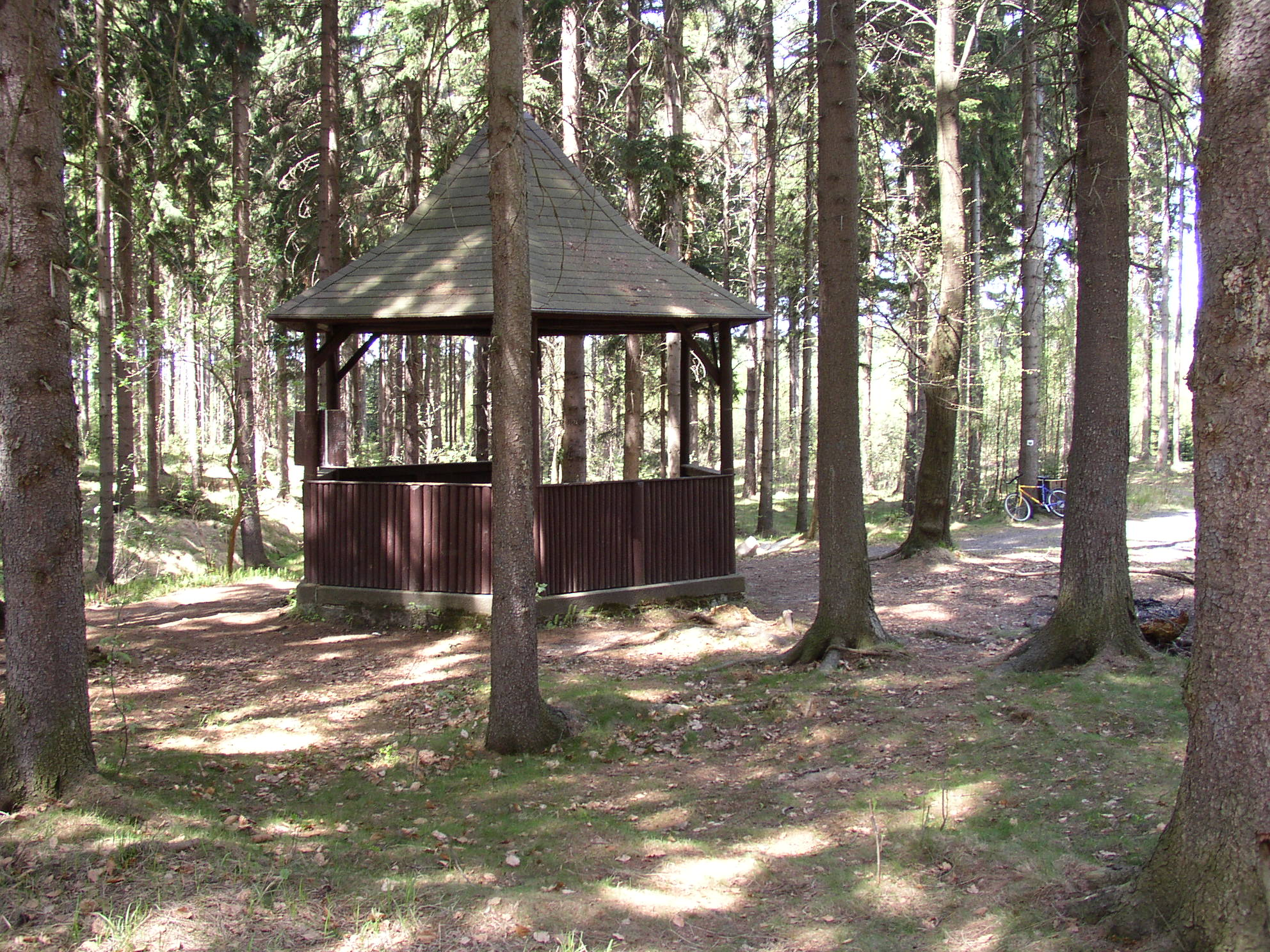 Pramen Křinice poblíž Studánky,okres Děčín, Česká republika